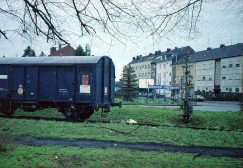 Dampfzug der DRWI im Bahnhof Distelrath